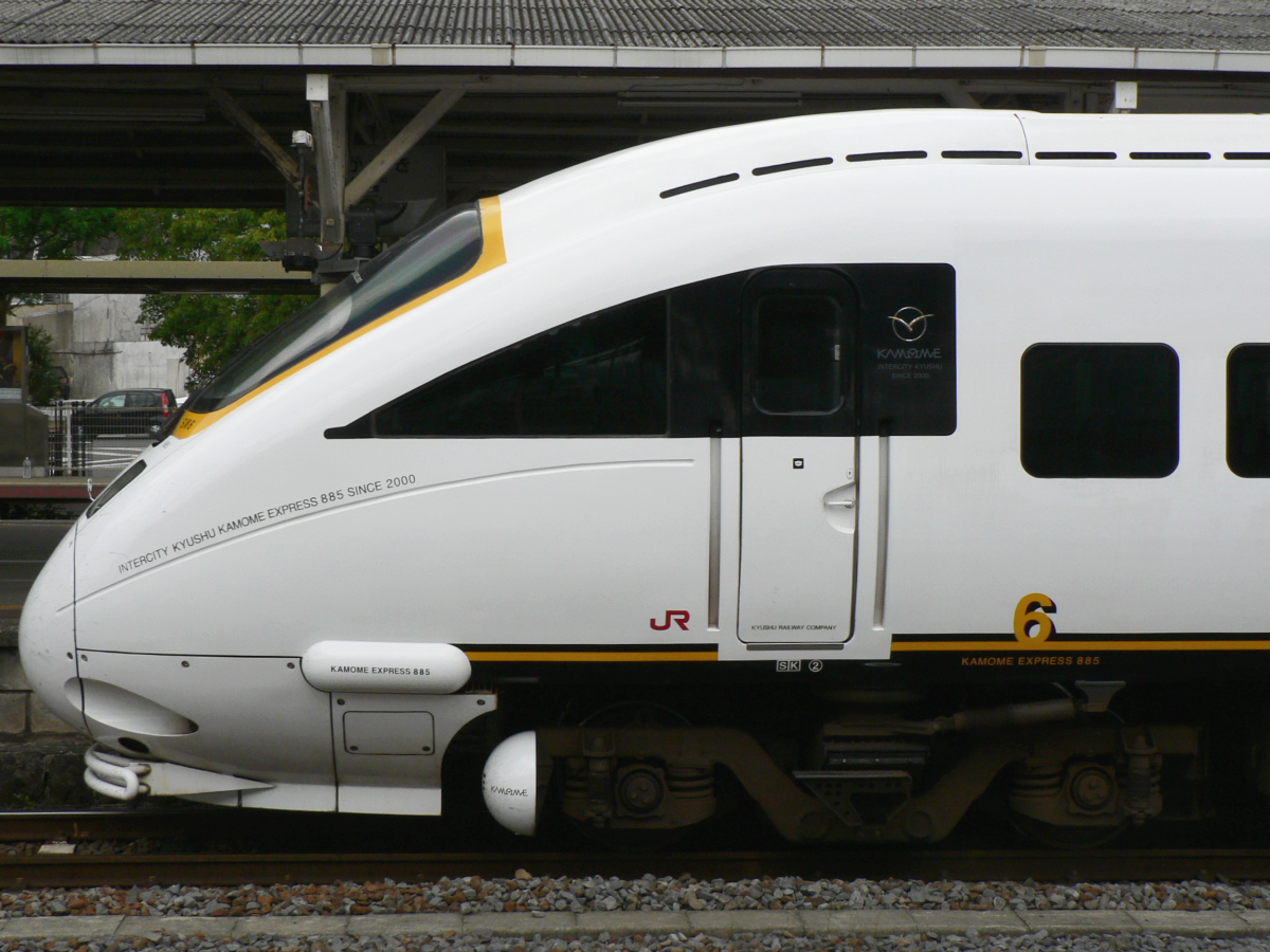 JR九州885系電車 SM6編成(かもめ用) 6号車(博多方先頭車、クモハ885-6)